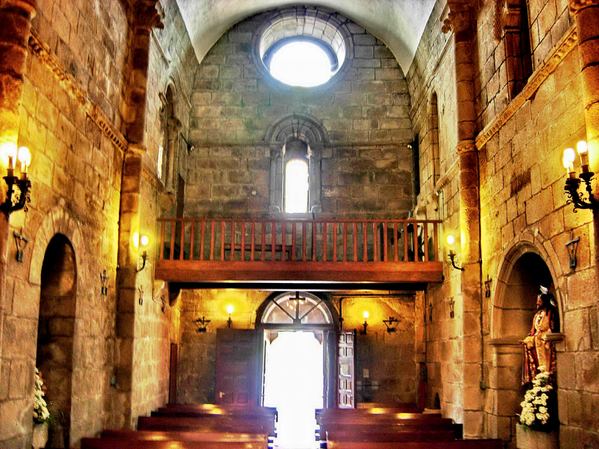 Vista do coro desde o altar da Igrexa de San Martiño de Sobrán - Vilagarcía de Arousa - Pontevedra